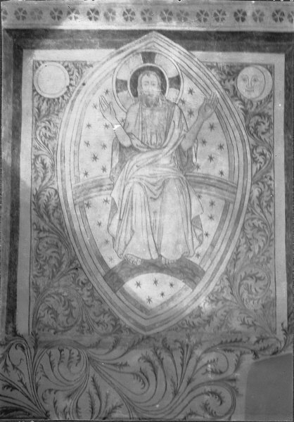 Korets norra vägg, efter restaurering. Kategori: (03) Kalkmålningar Korets norra vägg, efter restaurering.